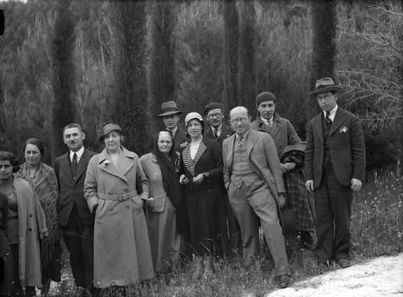 גניגר - אורחים ביער בלפור.